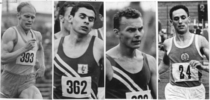 Matuschewski, May, Herrmann, Valentin Zentralbild Repro 24.7.1963 Leichtathletik: DDR-Staffel lief Weltrekord: 14:58.0 Einen DDR-Auswahl mit Manfred Matuschewski, Jürgen Mai, Siegfried Herrmann und Siegfried Valentin lief am 23.7.1963 bei einem Abendsportfest im Potsdamer Stadion Luftschiffhafen mit 14:58,0 min. neuen Weltrekord über 4 mal 1500 m. Bisheriger Rekordhalter war Frankreich (Claussee, Bogey, Jazy, Bernard) mit 15:04,2 Min. Die Franzosen waren diese Zeit am 28. Juni 1961 in Versailles gelaufen. UBz: Von links nach rechts: Siegfried Valentin, Jürgen May, Siegfried Herrmann und Manfred Matuschewski. (Bildzusammenstellung)